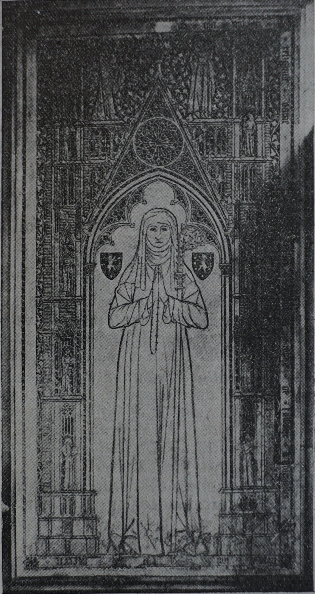 pierre tombale de l'Abbesse marguerite de châteauvillain d argensolles déplacée à Epernay.